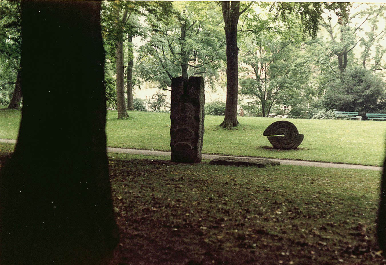 Hundeshagenpark (1984)